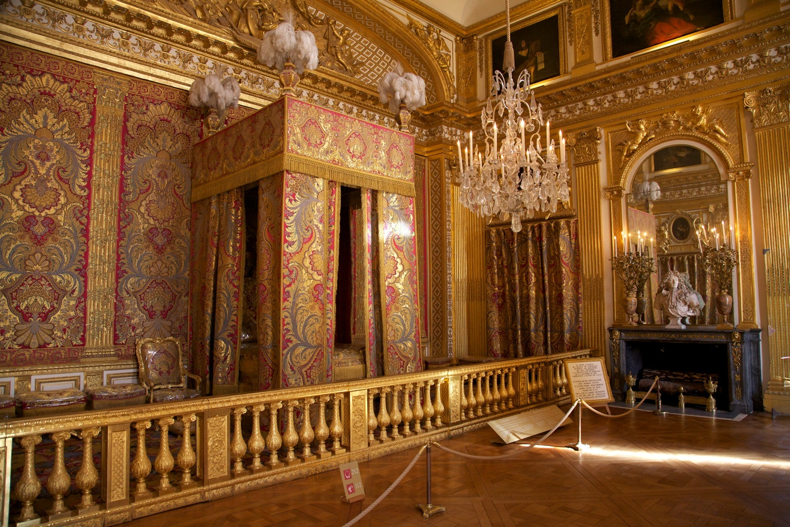 Appartement du Roi, Palace de Versailles